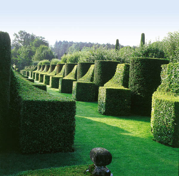 Photo des Jardins du Manoir d'Eyrignac